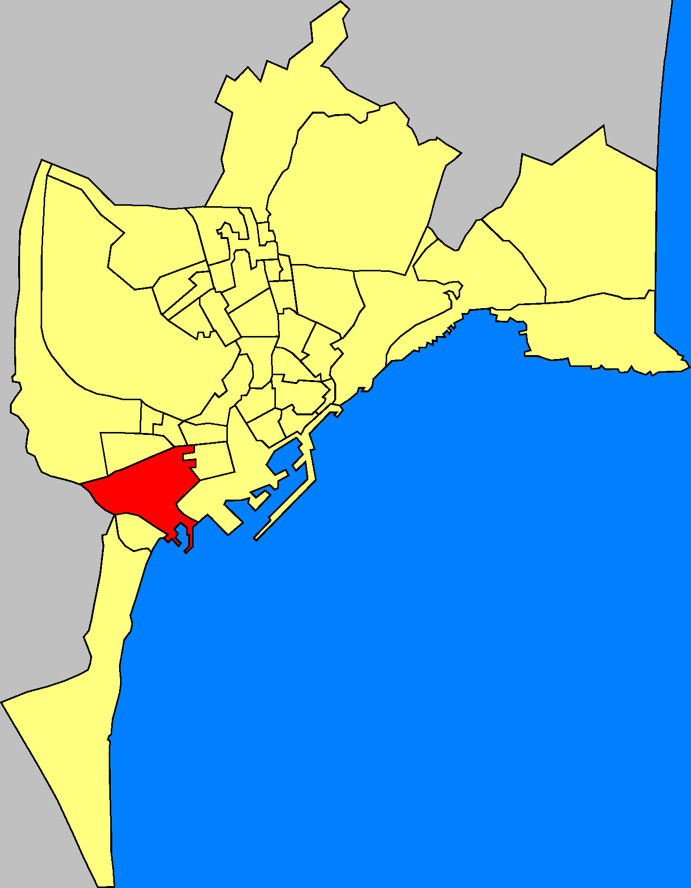 Mapa marcando el barrio Poligono Babel de Alicante